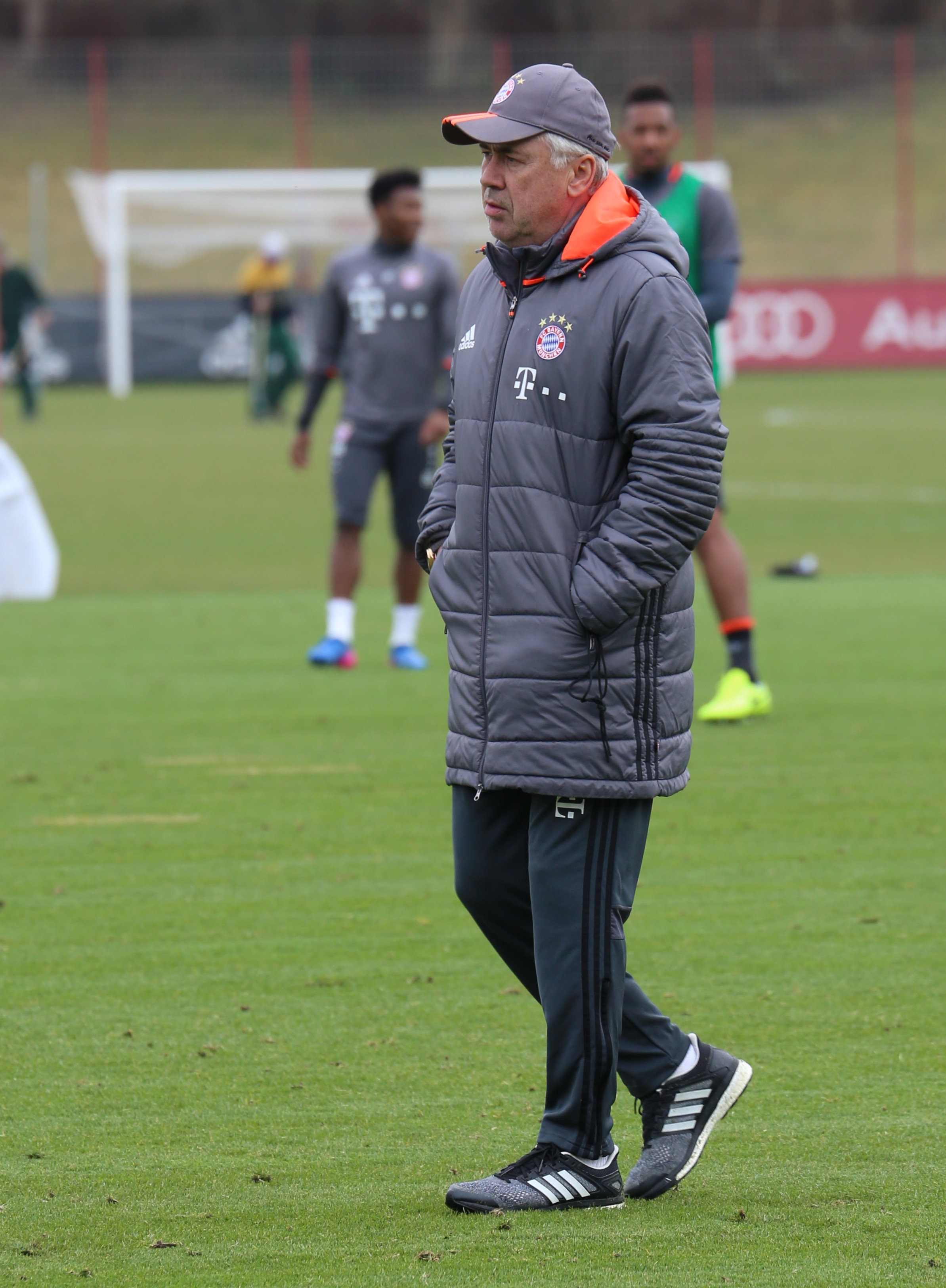 Carlo Ancelotti, Trainer, am 14. März 2017 beim Training auf dem Gelände des FC Bayern München